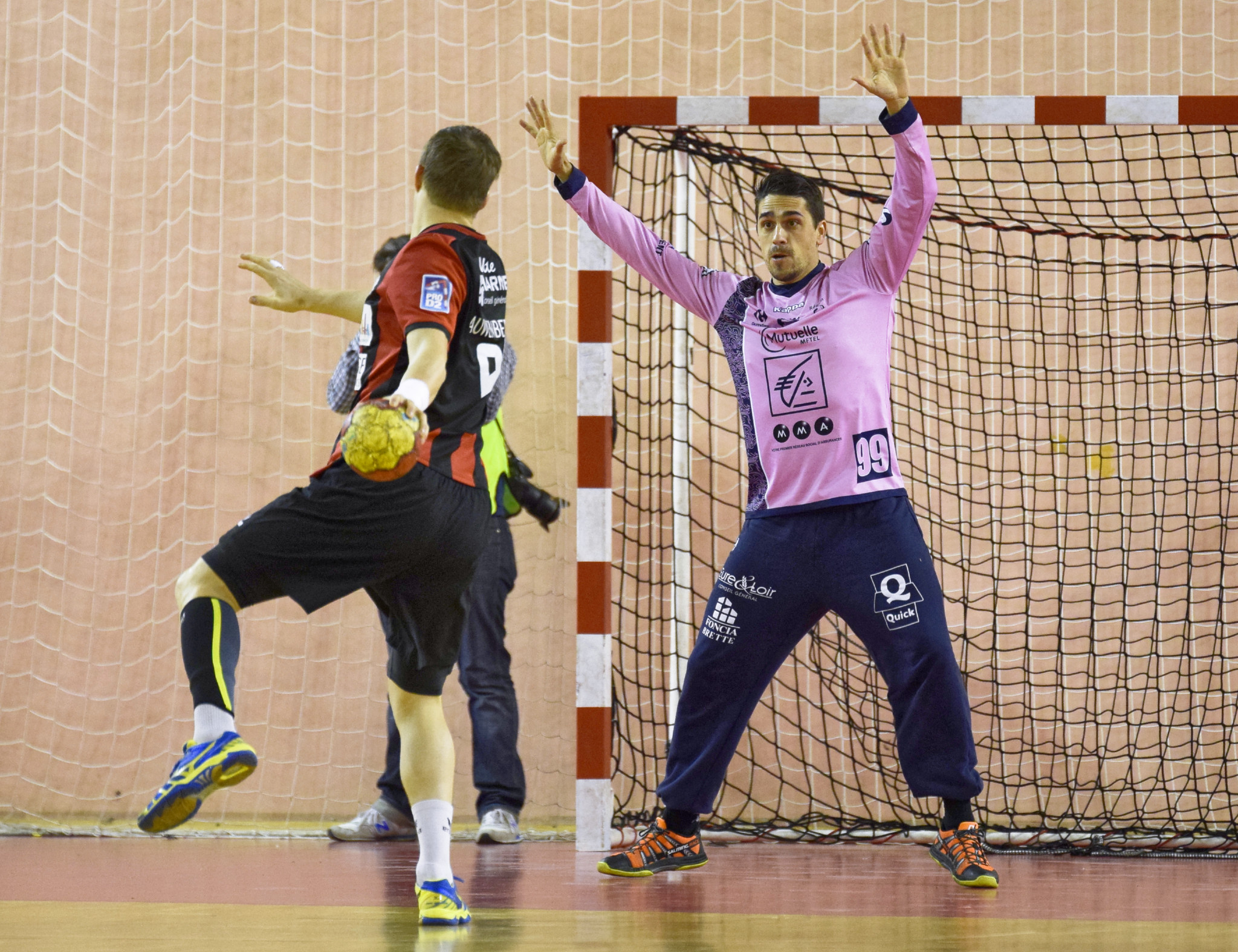 Rencontre de ProD2 entre l'US Ivry handball et Chartres HB. A Ivry, le 06 décembre 2014.